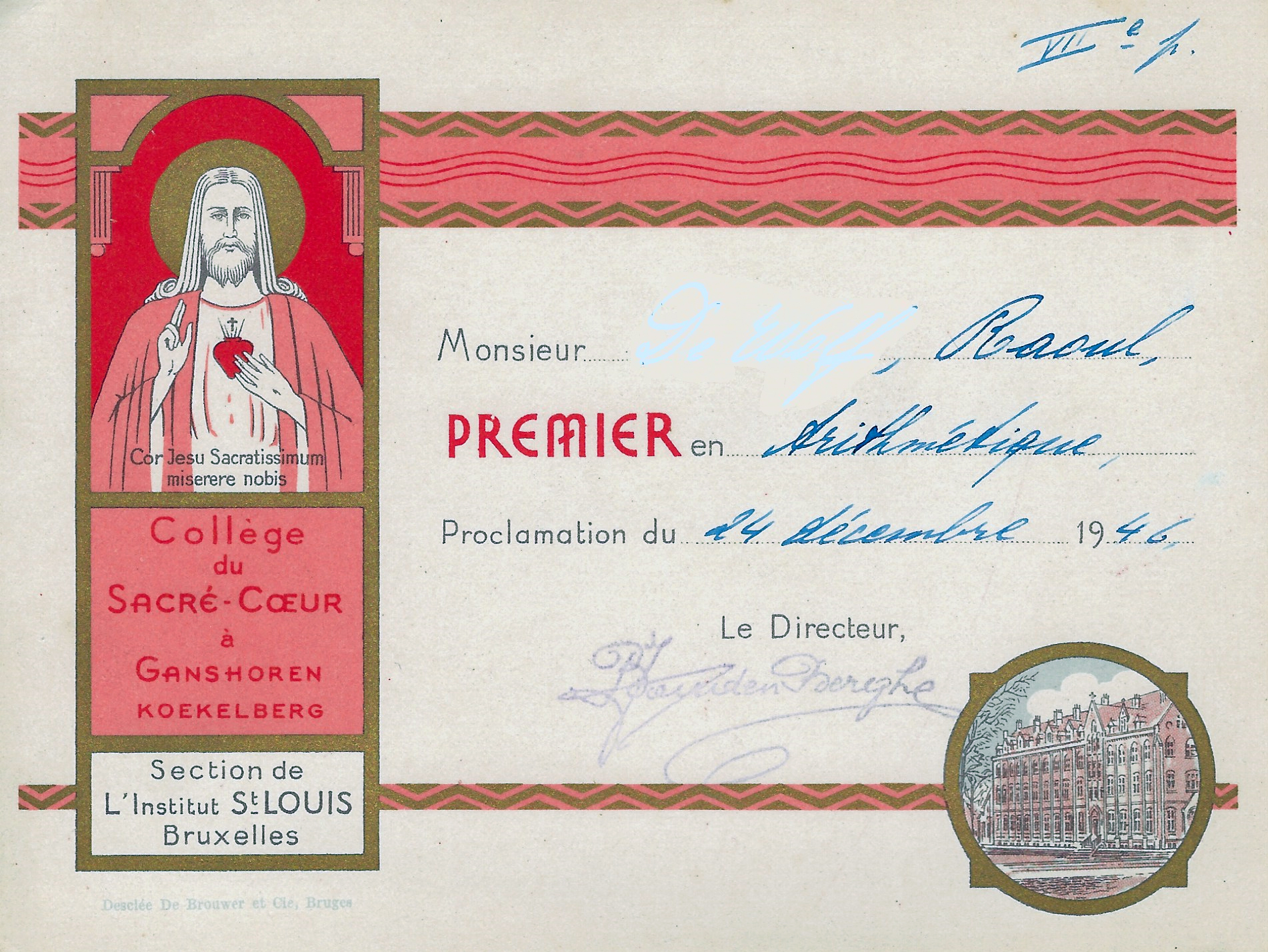 Erekaart voor het vak rekenen in de 7e (laatste) jaar van de Franstalige voorbereidende in 1946. Heilig-Hart-college in Ganshoren. Let op de tekst linksonder "Section de l'institut St.-Louis"